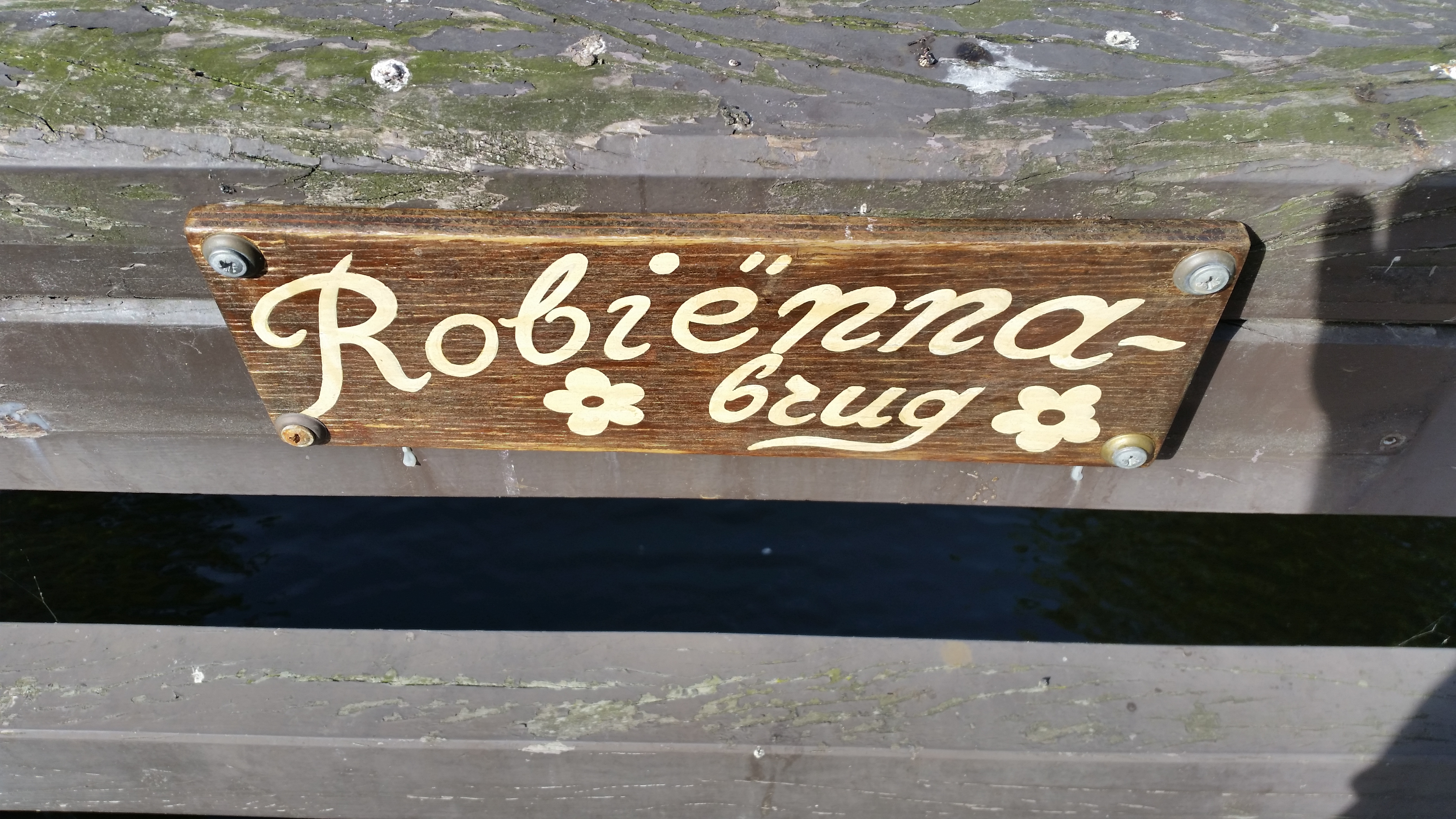 Naamplaats van Brug 1910, Robiënnabrug